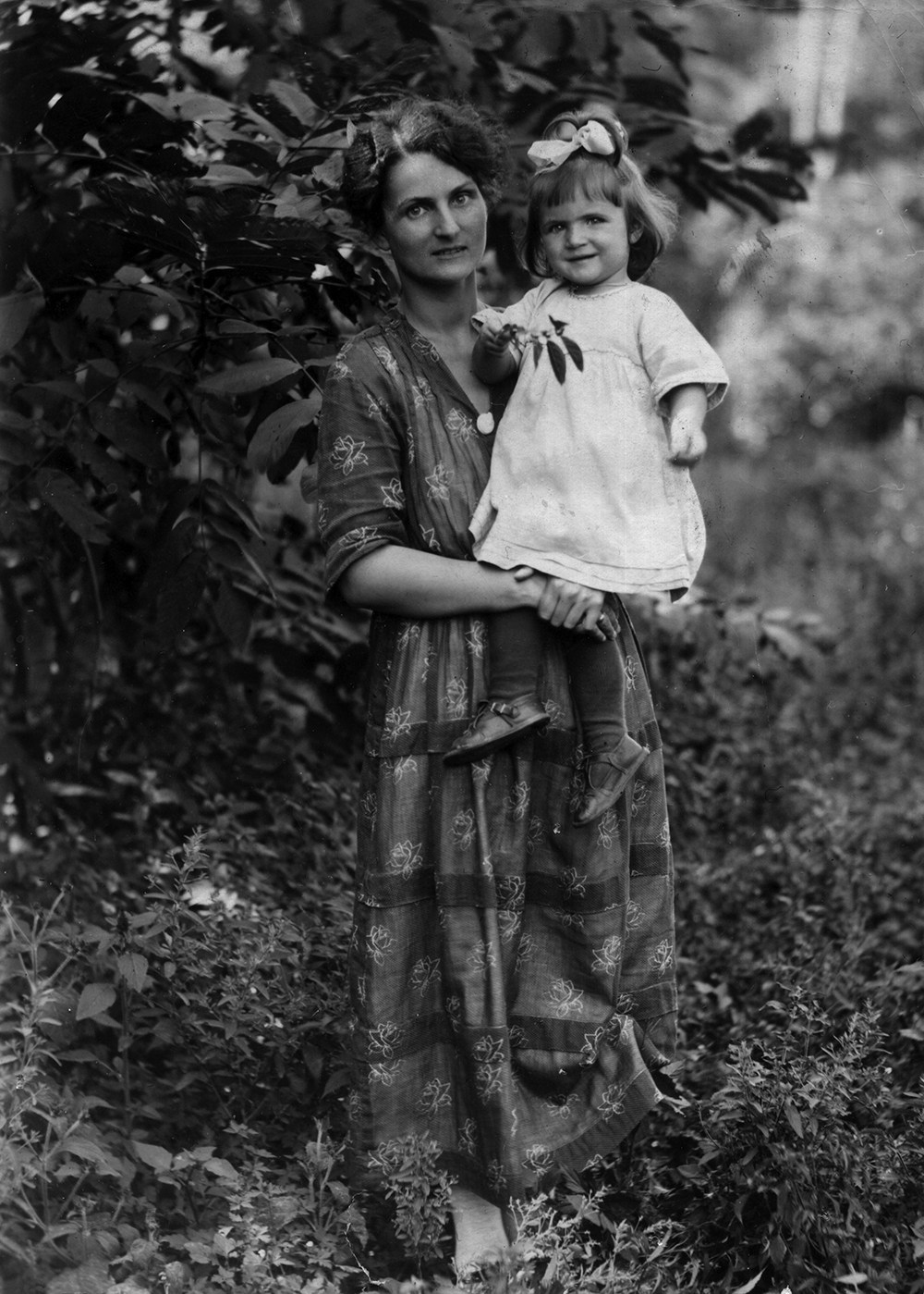 Жена В. К. Арсеньева Маргарита Николаевна держит на руках их дочь Наташу